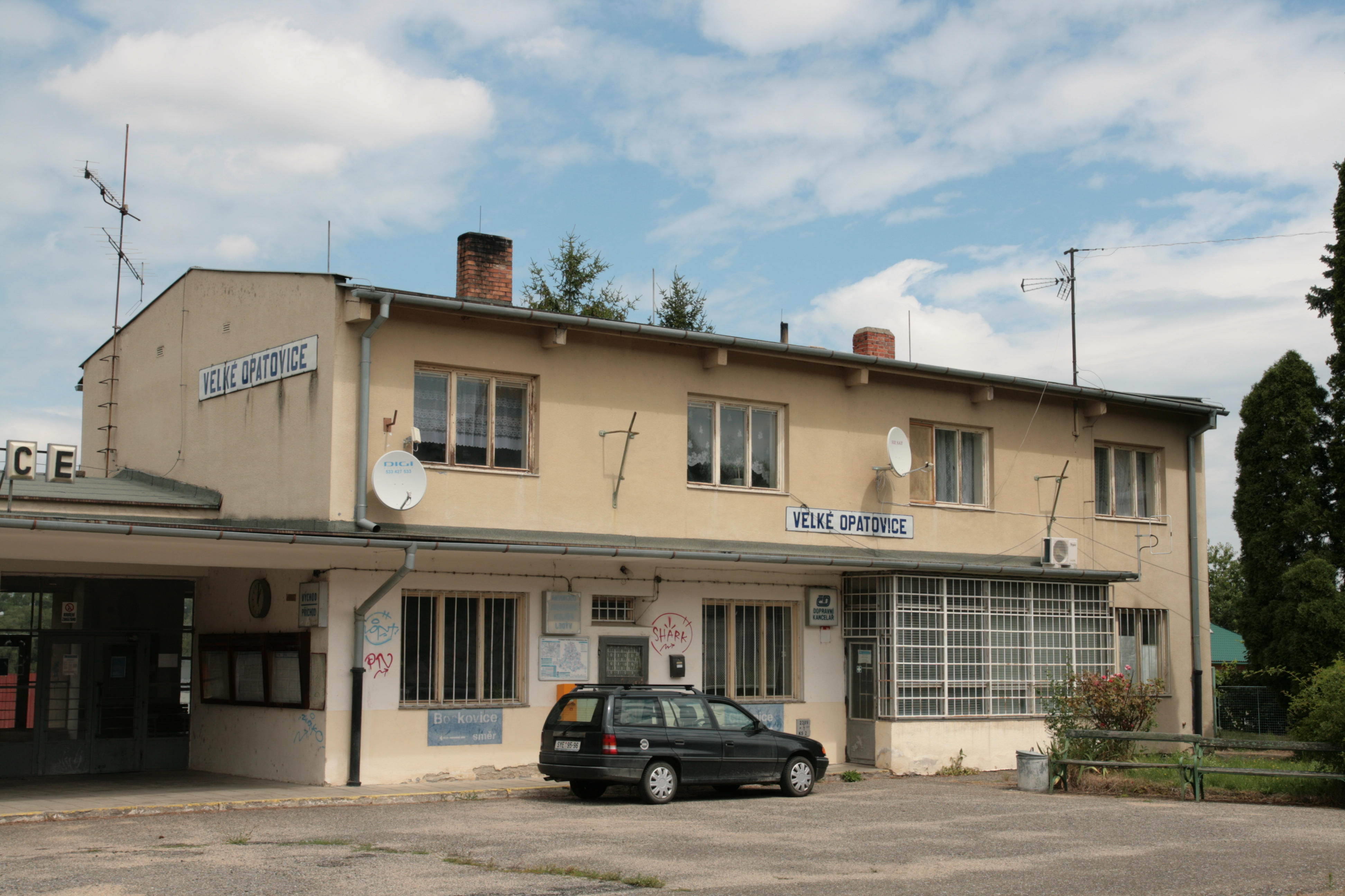 Město Velké Opatovice v okrese Blansko. Nádražní budova vlakové stanice. Pohled o nástupišť.